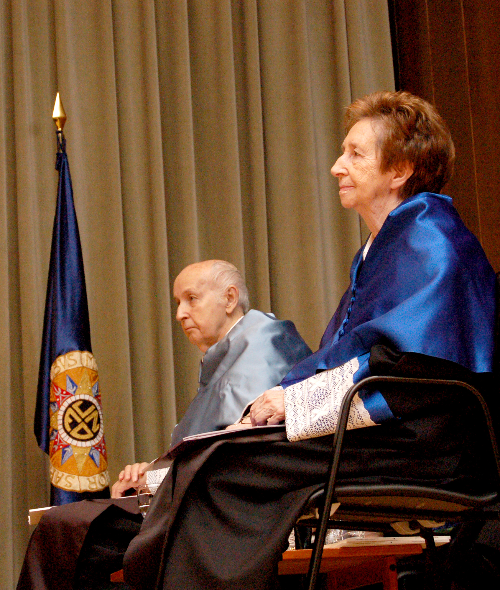 Margarita Salas y Santiago Grisolía